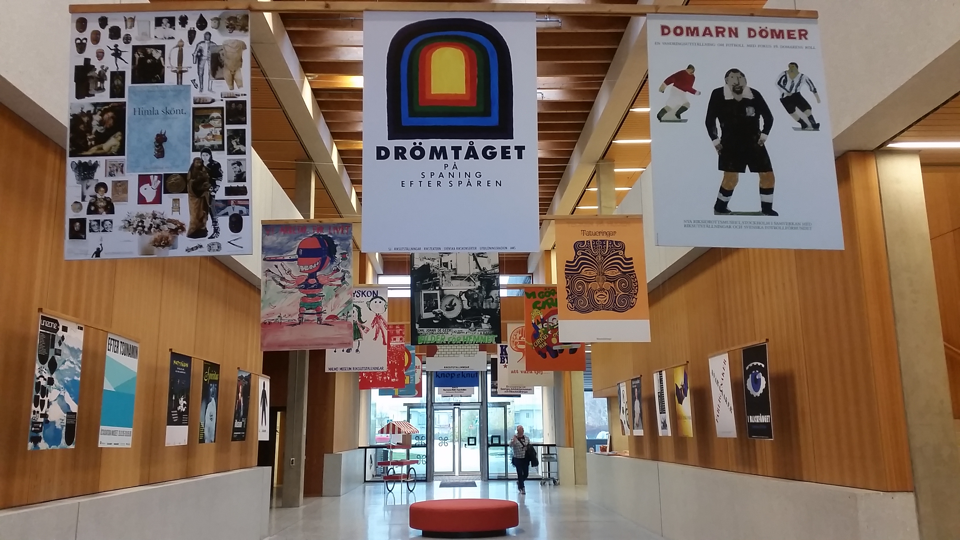 Utställning av affischer i Riksutställningars entré, november 2015.